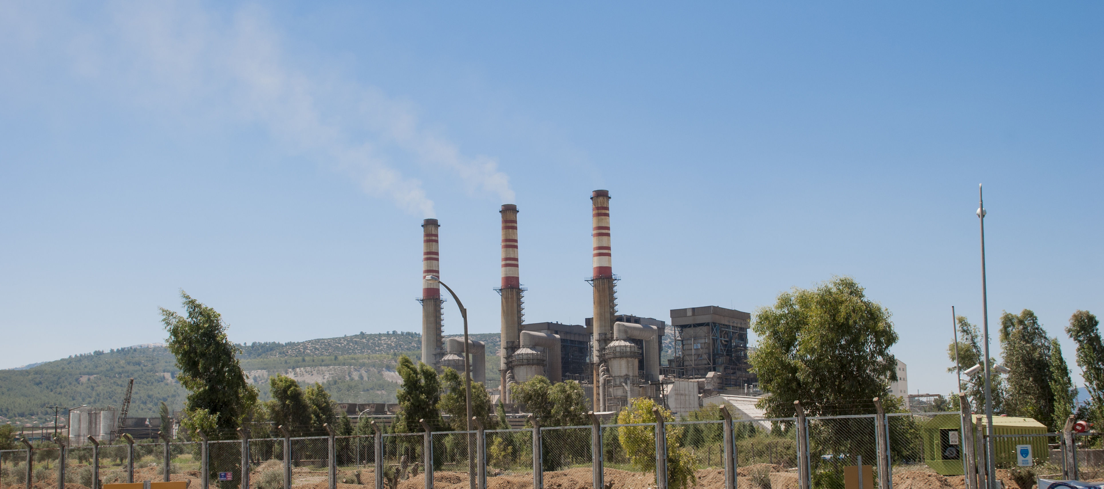 Muğla ili, Yatağan ilçesindeki linyit termik santrali.